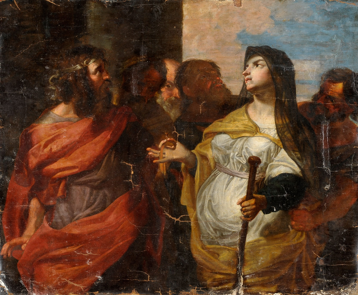 Juda und Thamar. Öl auf Leinwand, 120 x 144 cm (Italienischer Meister 17. Jhdt.)